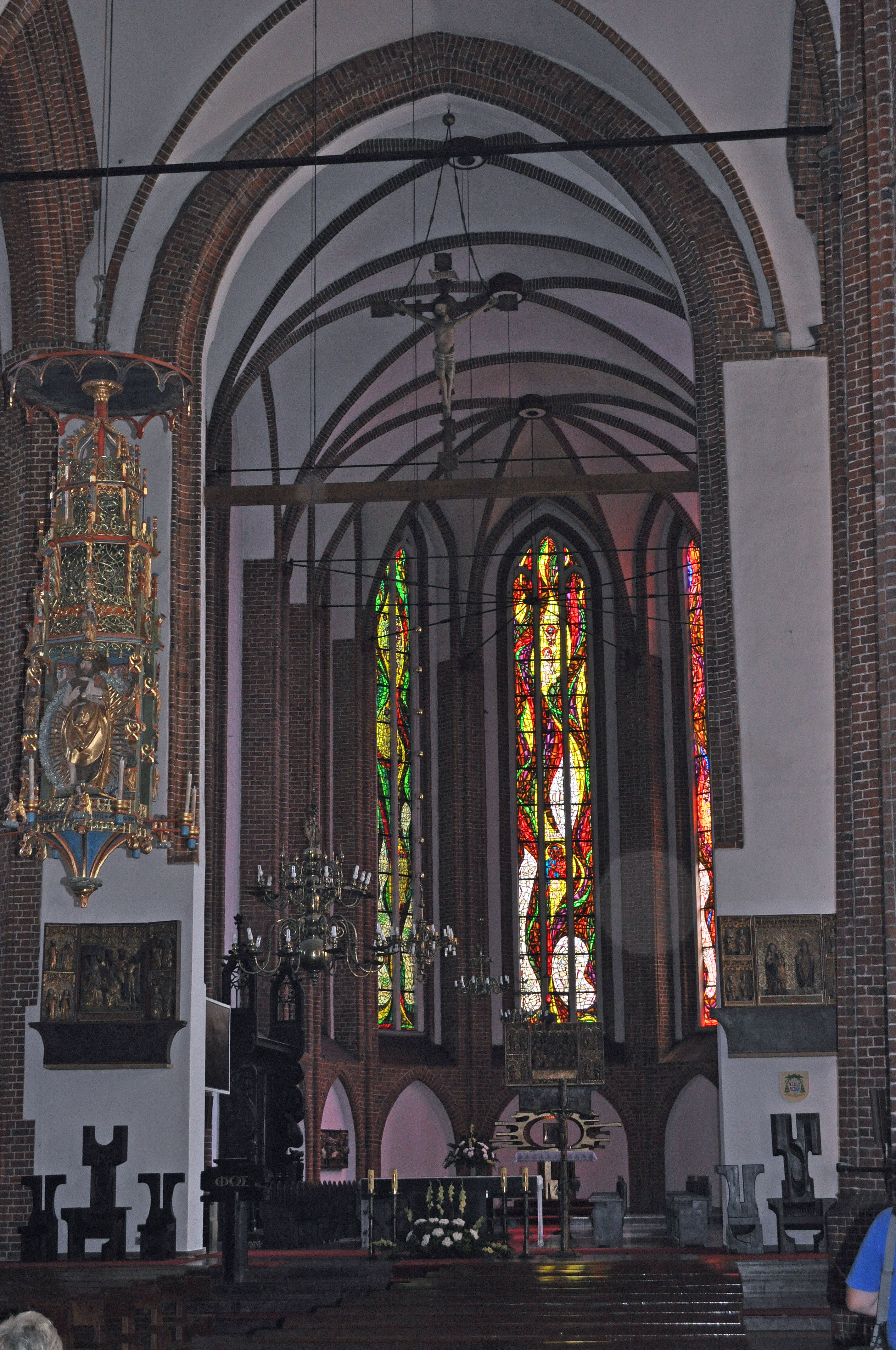 In Kołobrzeg (Polen). Aufgenommen am 27. Juli 2011.